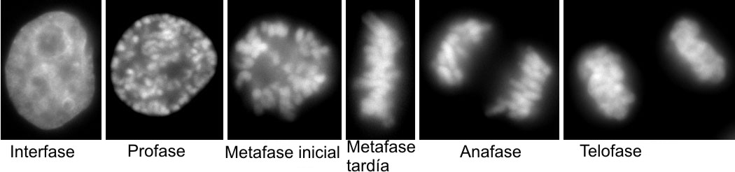 Fases da mitose